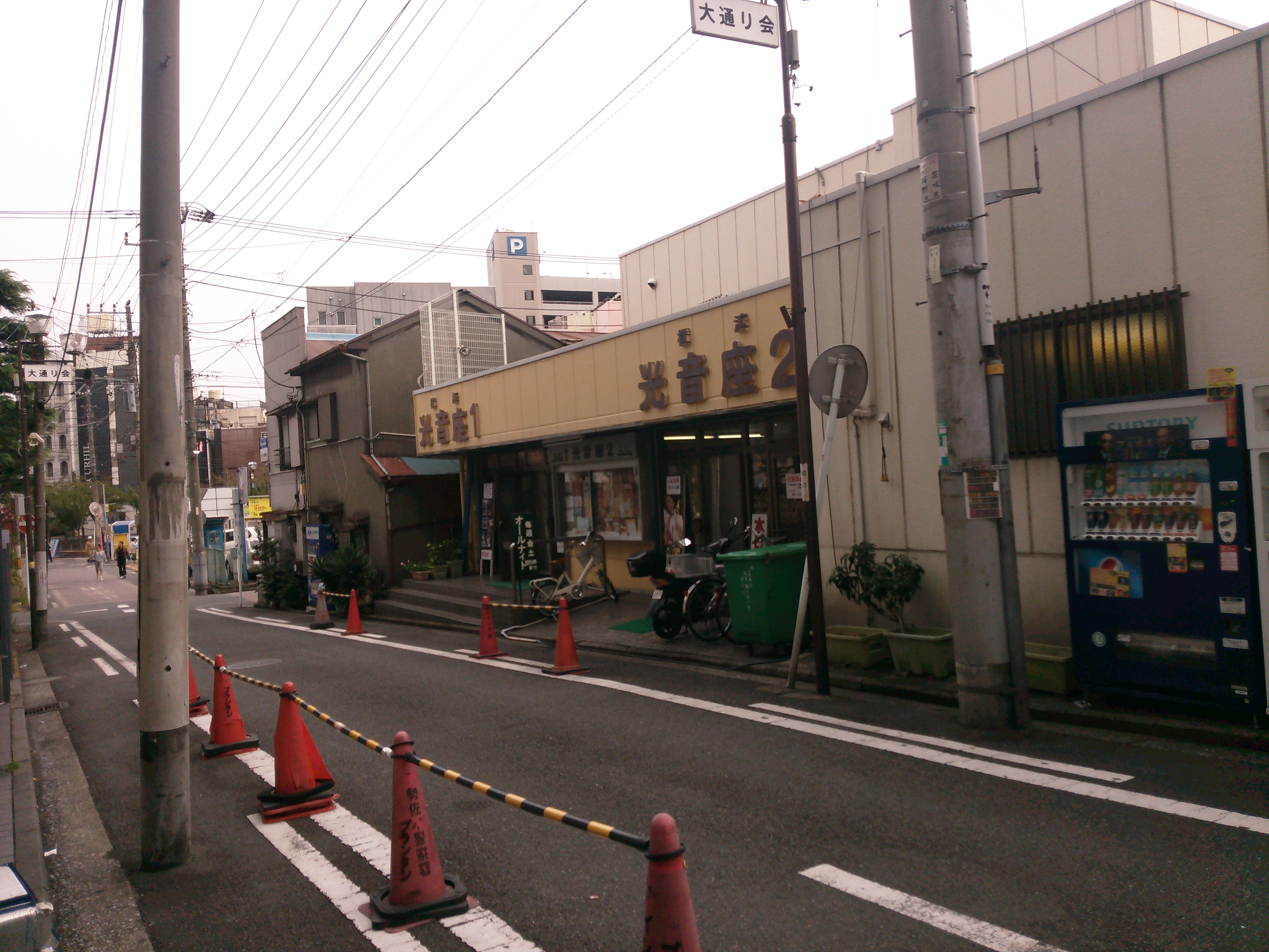 横浜市中区宮川町の映画館「光音座」